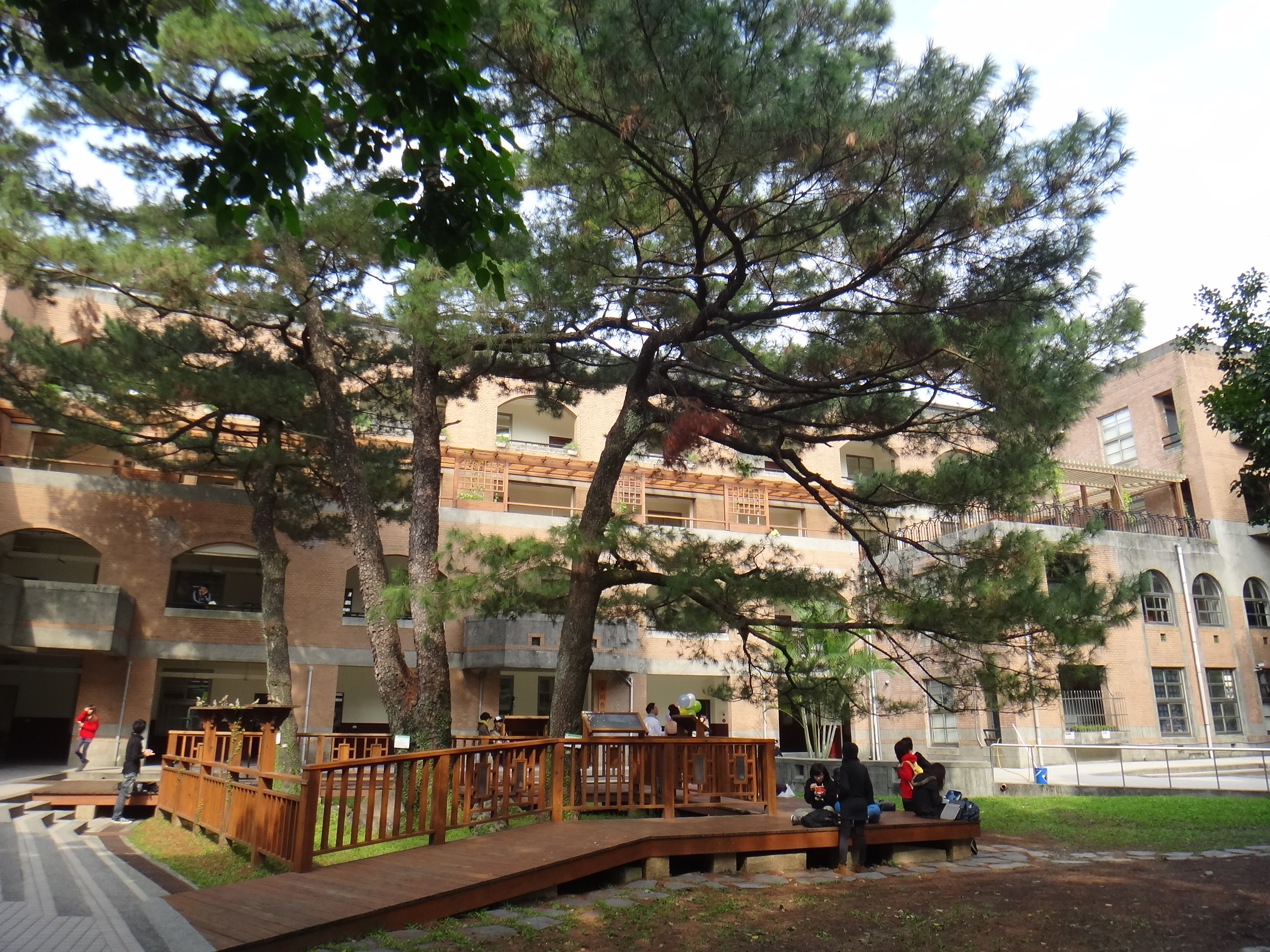 國立臺灣大學共同教學館舟山路側與共同三松。